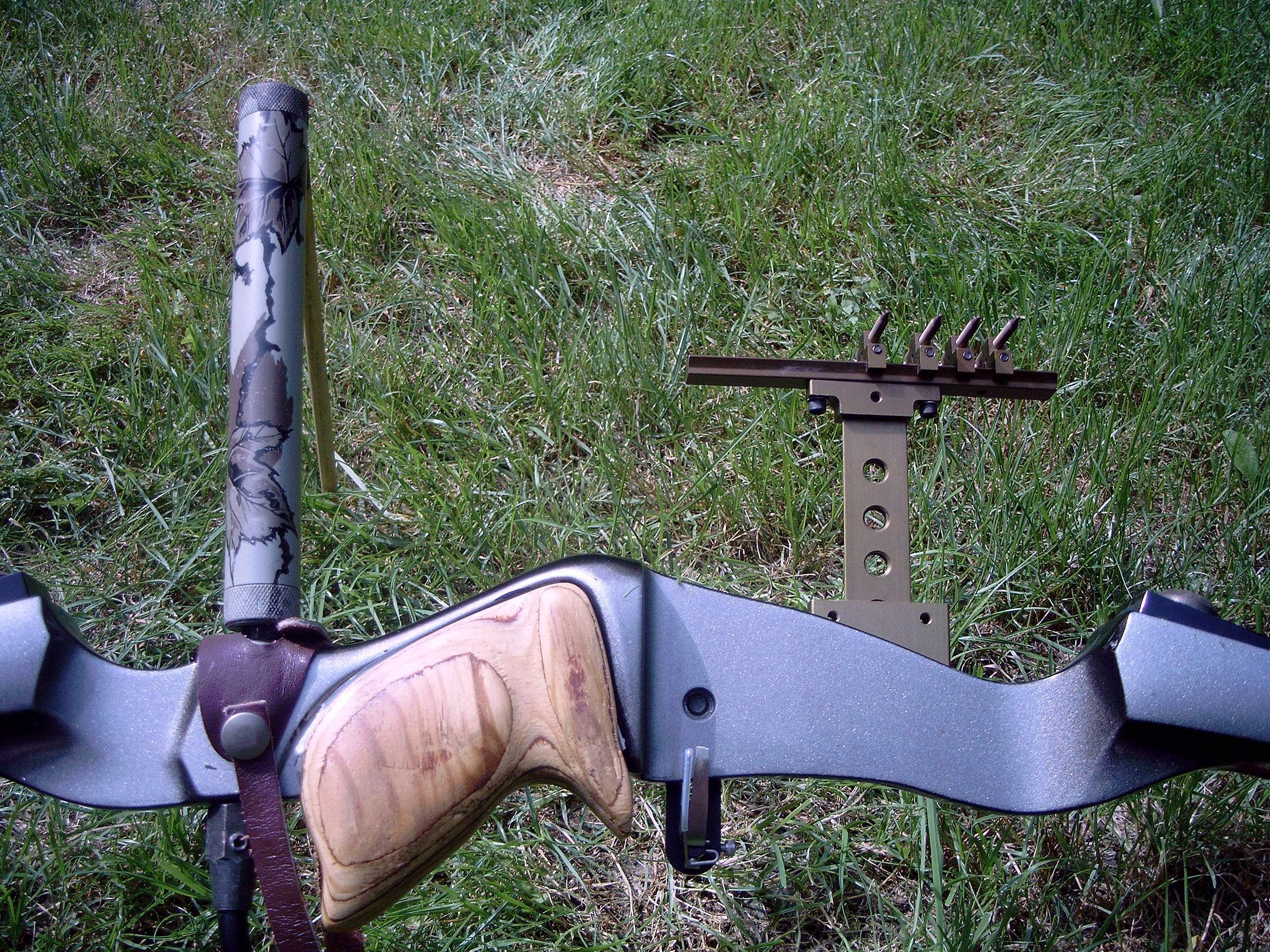 Stabislisator & Pinvisier